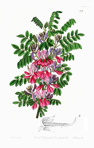 Dosua Indigo - Indigofera dosua